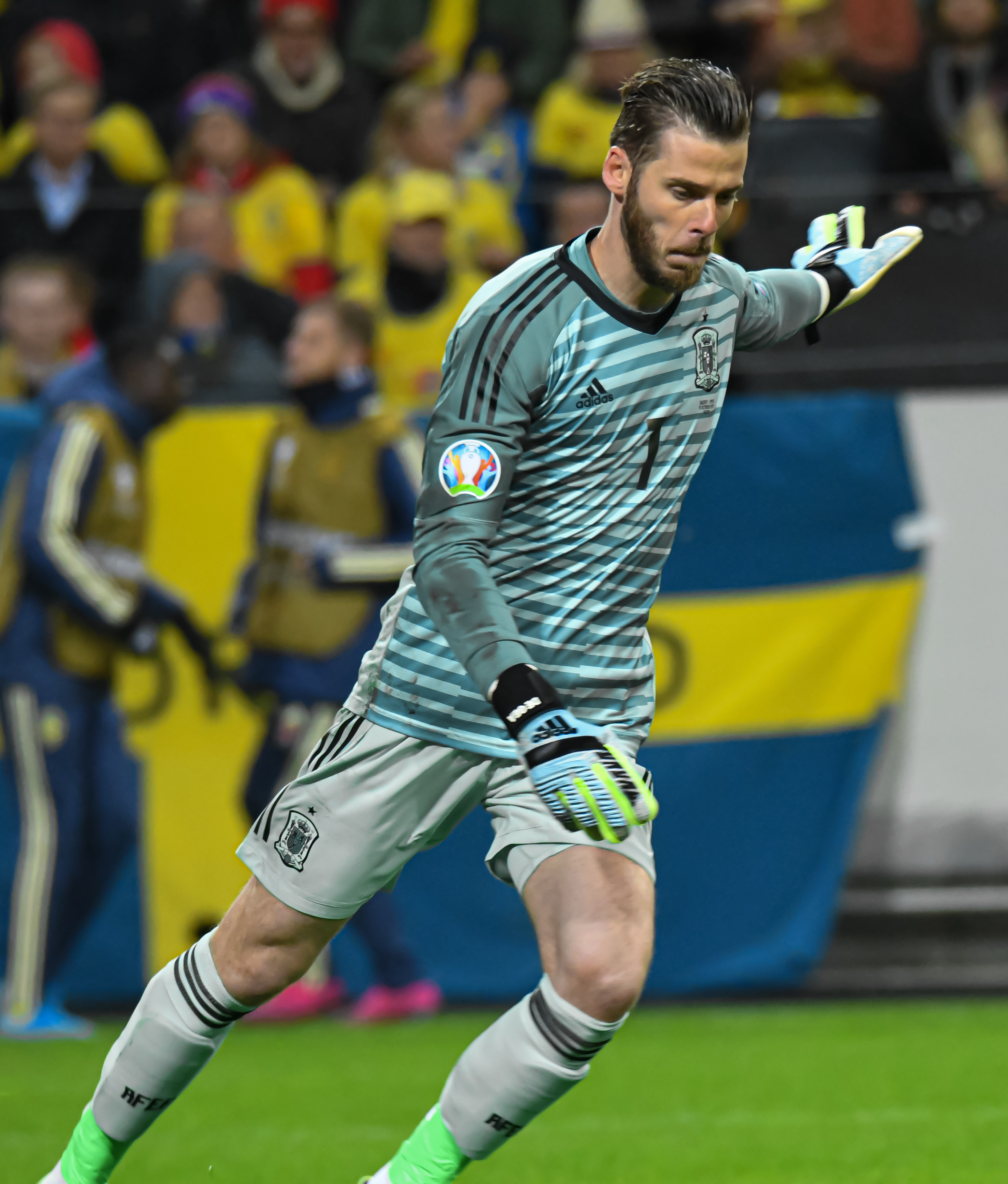 UEFA EURO qualifiers Sweden vs Spain 20191015